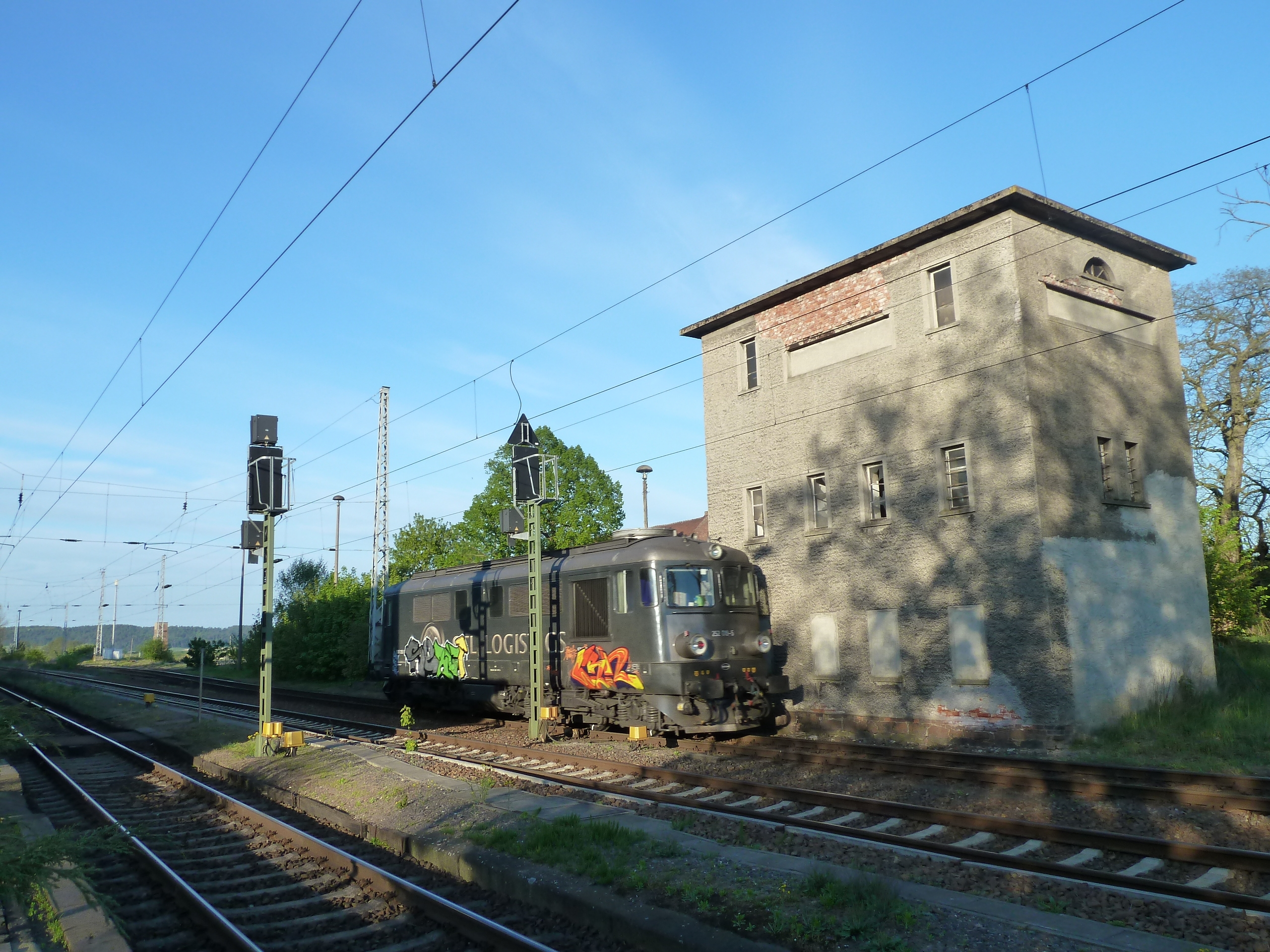 Lokomotywa spalinowa ST43 w malowaniu przewoźnika CTL Logistics na stacji Passow.